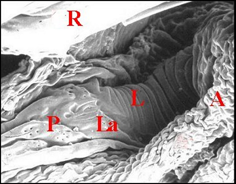 Pédicule de Meta bourneti en vue latérale gauche au microscope électronique à balayage.